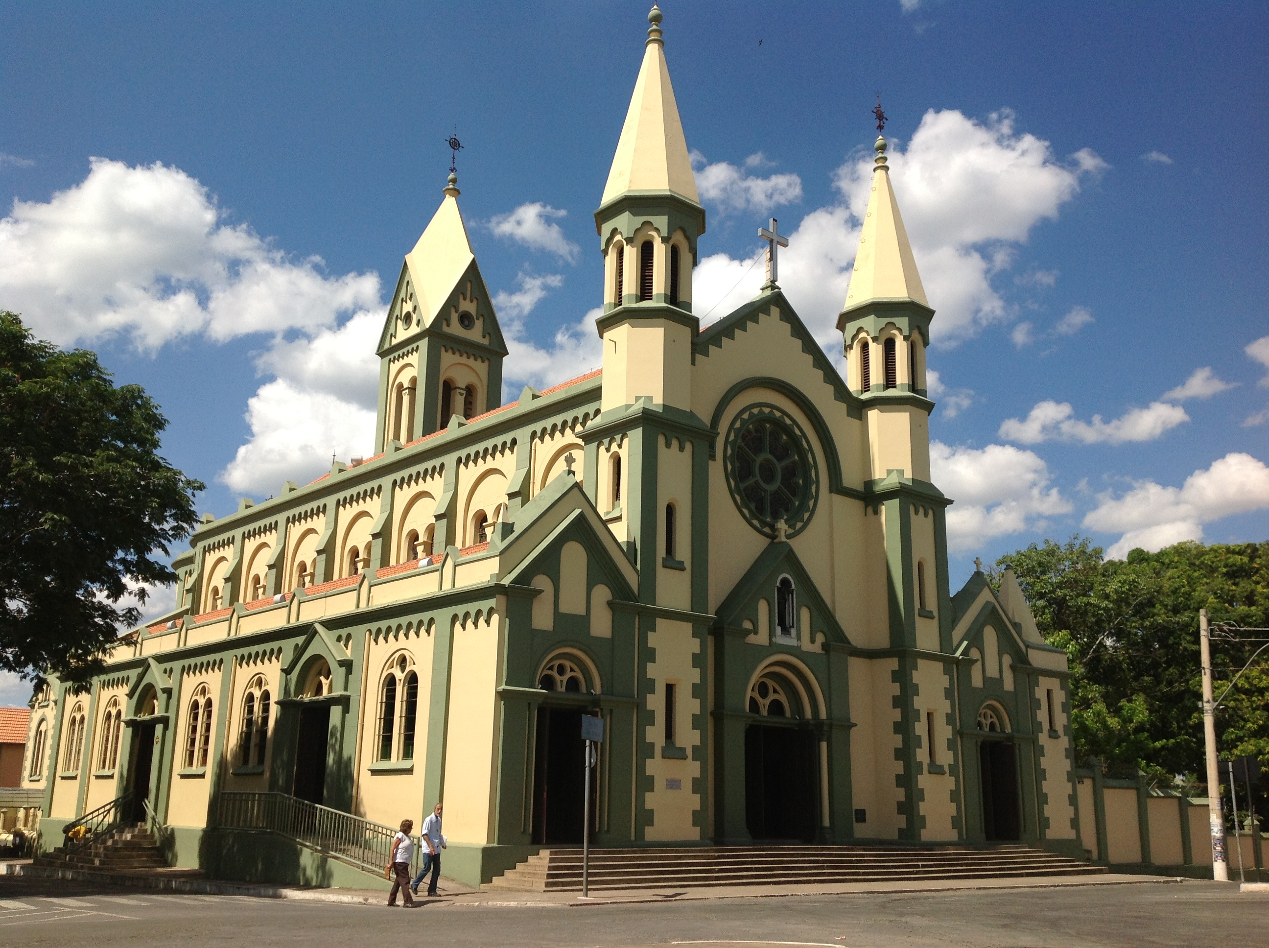 Imagem da Basílica de São Geraldo Magela, em Curvelo, Minas Gerais, Brasil